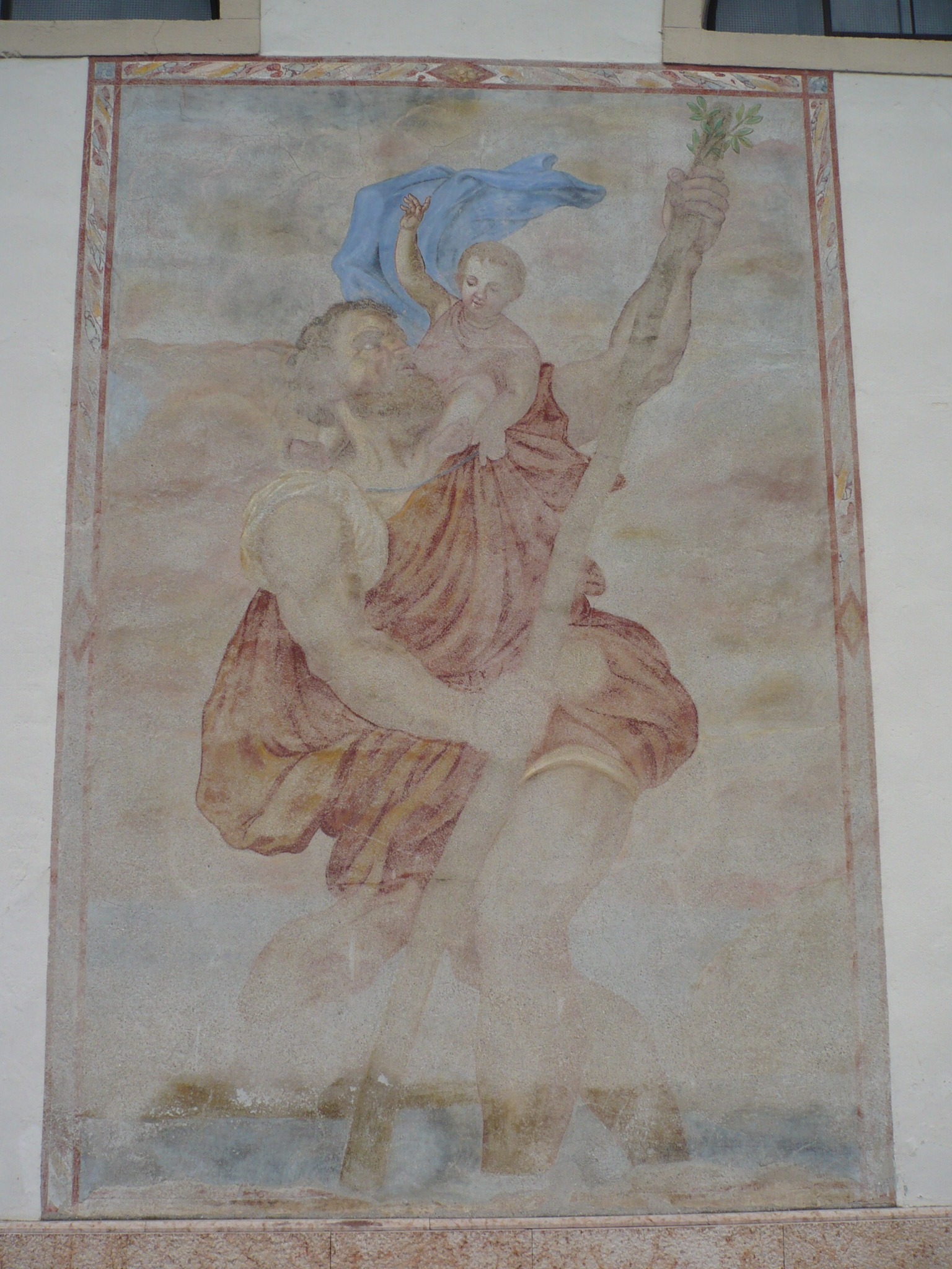 L'affresco che raffigura san Cristoforo che si trova sulla facciata sud della chiesa dei santi Pietro e Paolo a Imèr, in TrentinoEsperanto: Fresko de sankta Kristoforo je la suda fasado de la preĝejo dediĉita al la sanktuloj Petro kaj Paŭlo en Imèr, en norda Italio